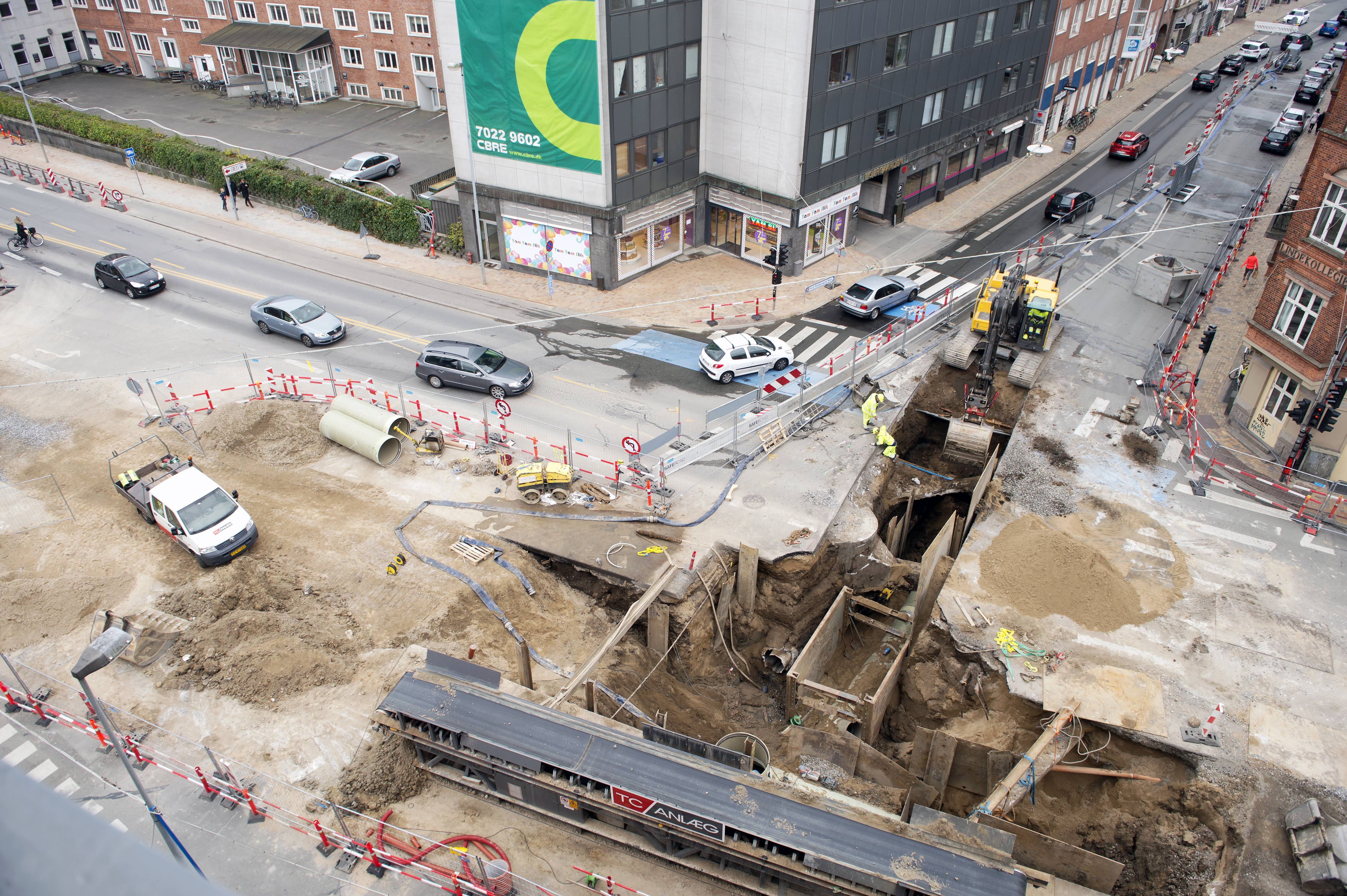 Kloakudgravning